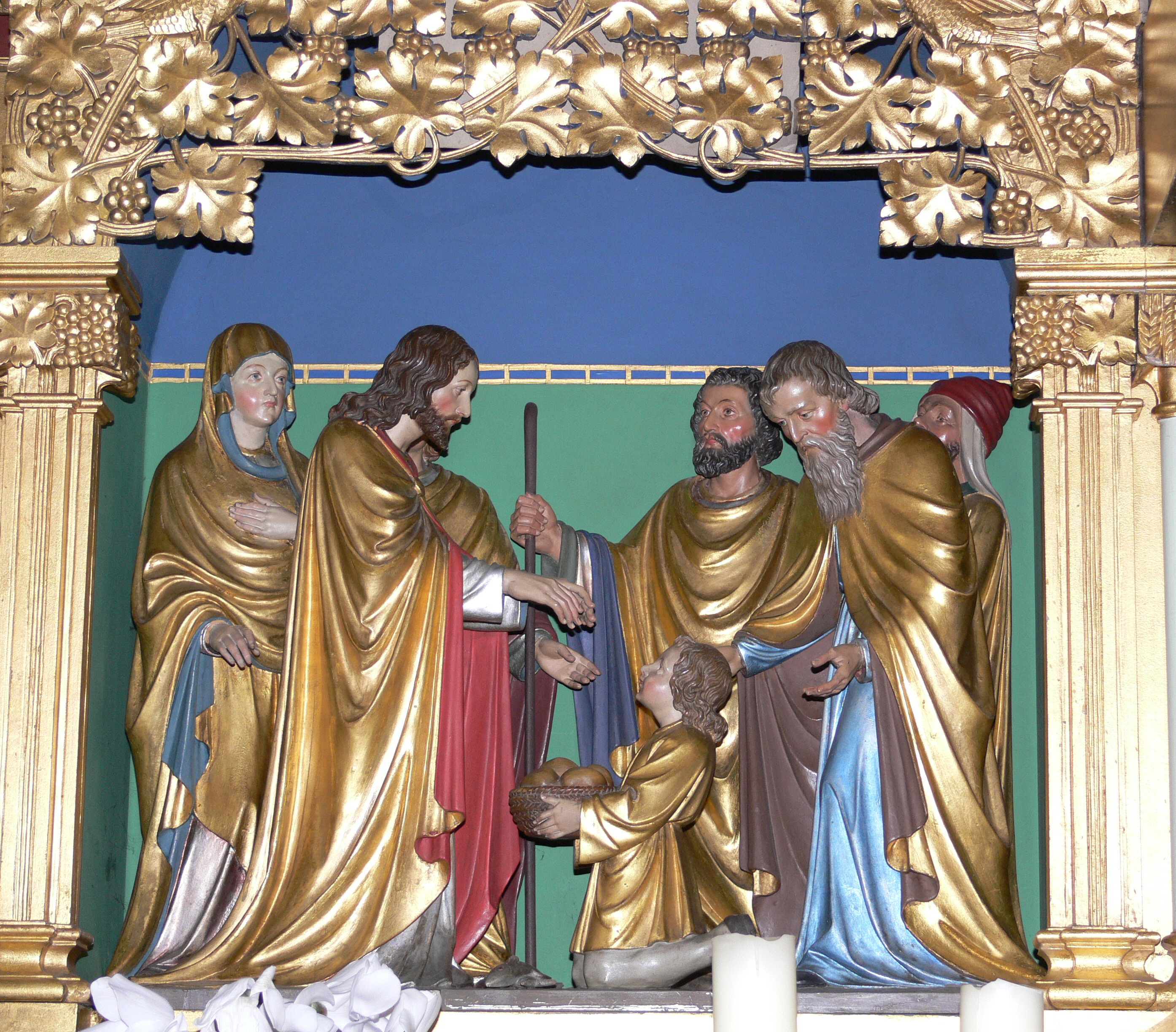 Mochenwangen, Pfarrkirche Mariä Geburt, Hochaltar von Theodor Schnell d. J.; Detail: Brotwunder